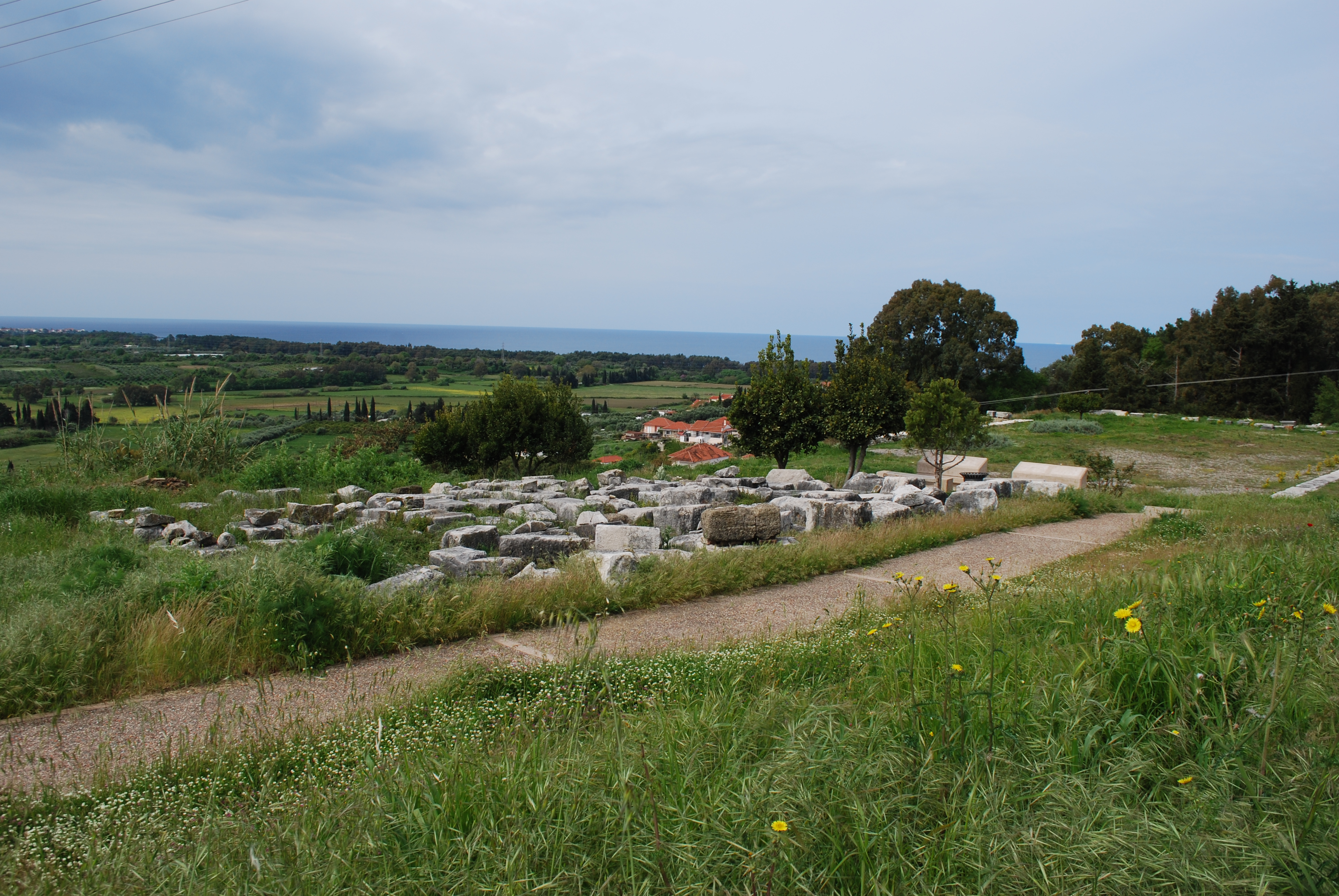 Vue de Nicopolis en Epire.